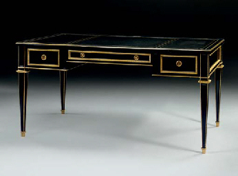 sello D Simon Loscertales Bona